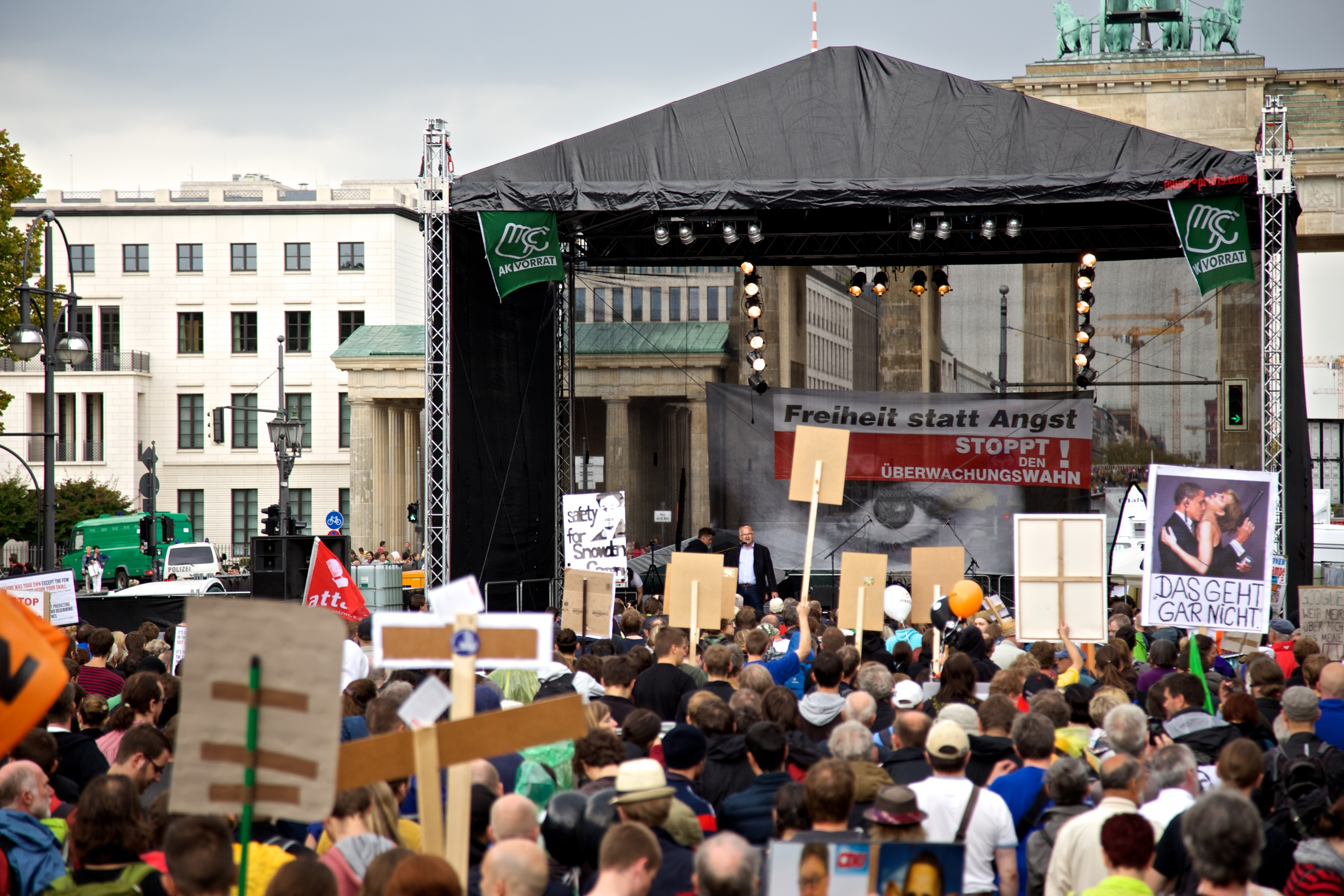 Am 30. August 2014 fand in Berlin die jährliche 'Freiheit statt Angst' Demonstration statt. Protestiert wurde gegen die Totalüberwachung von NSA, GCHQ und BND und für digitale Menschen- und Bürgerrechte sowie für die Freiheit und den Schutz von Whistleblowern. Weitere Infos: freiheitstattangst.de/ Demonstration Freiheit statt Angst 2014